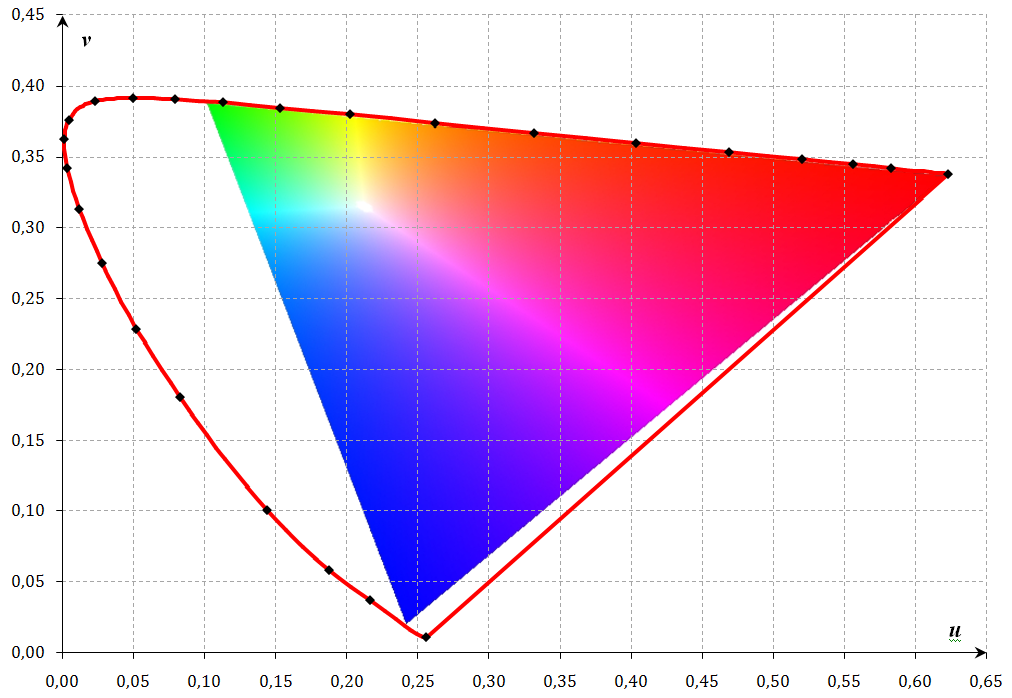 Diagramme de chromaticité tiré du système CIE UVW